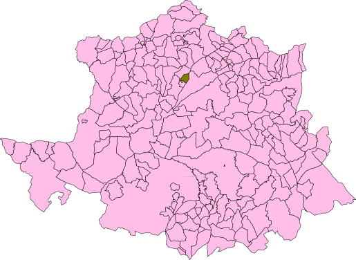 Carcaboso